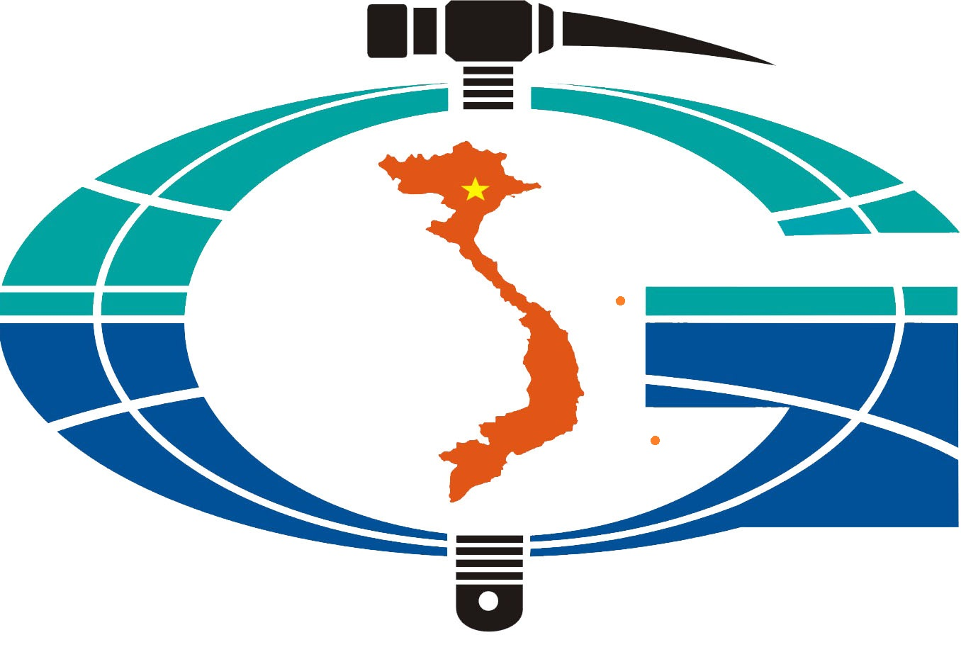 ảnh logo viện địa chất